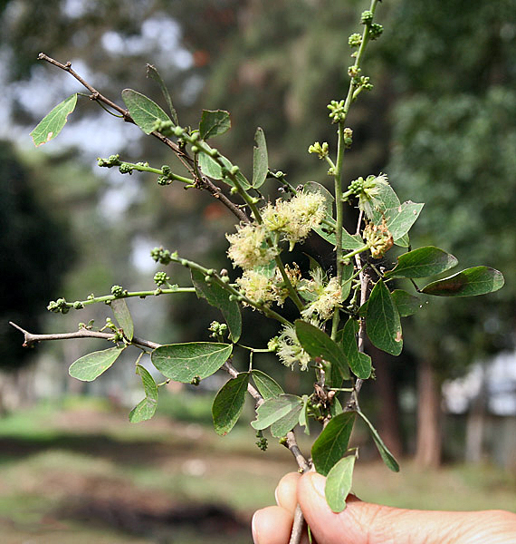 Jungle Jalebi Pithecellobium dulce in Kolkata, West Bengal, India.